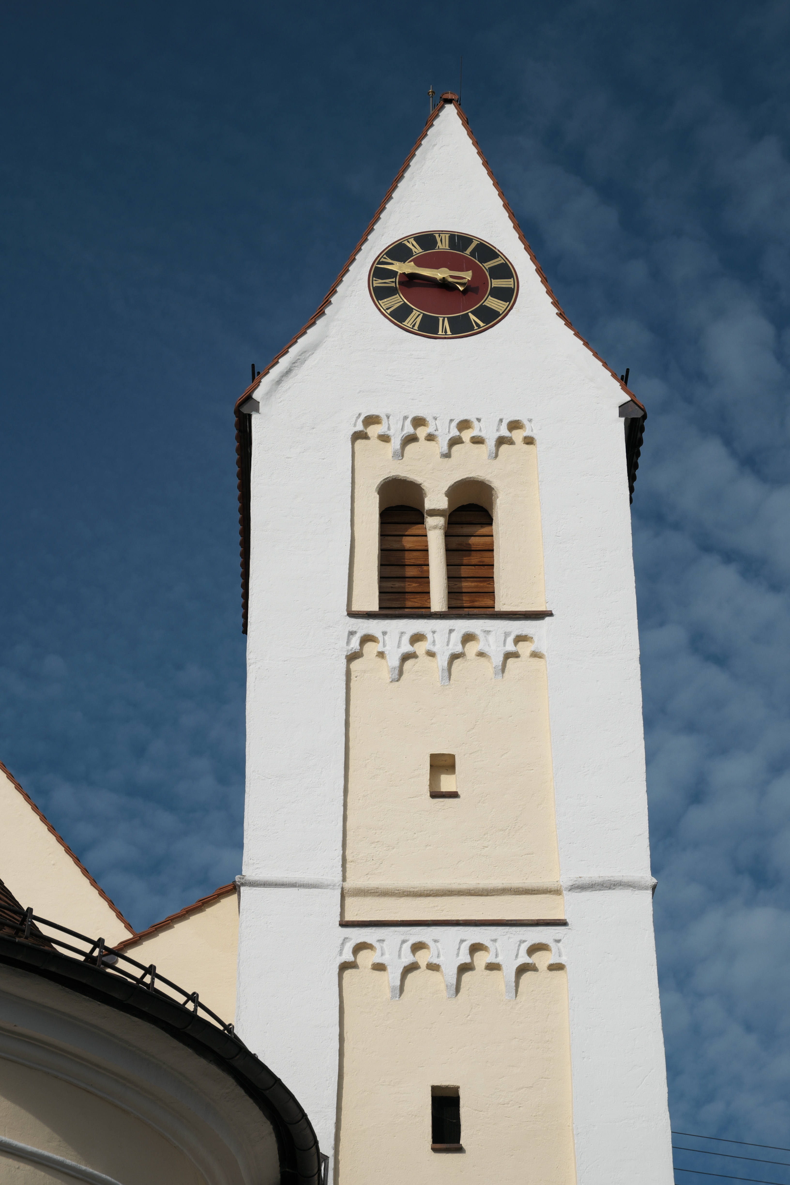 Katholische Pfarrkirche Zur Schmerzhaften Muttergottes in Waalhaupten (Waal) im Landkreis Ostallgäu (Bayern/Deutschland)